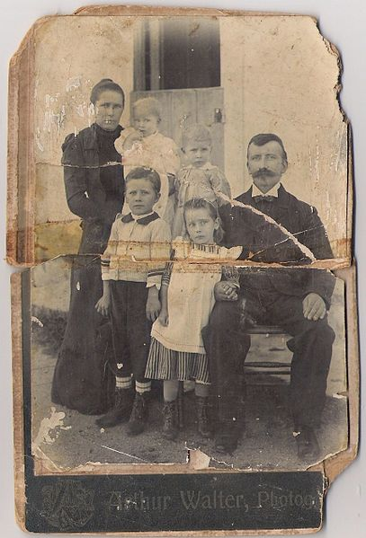 Adolpho Kindermann, sua mulher Helena Buss May Kindermann e seus quatro primeiros filhos, ca. 1905. Fotografia cedida por Estela Maria Kindermann Bianchini, Braço do Norte/SC. Acervo da família